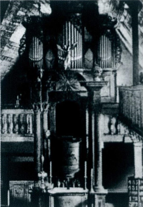 Orgel von Gottfried Silbermann (1731) in der Stadtkirche Mylau, Sachsen, Deutschland